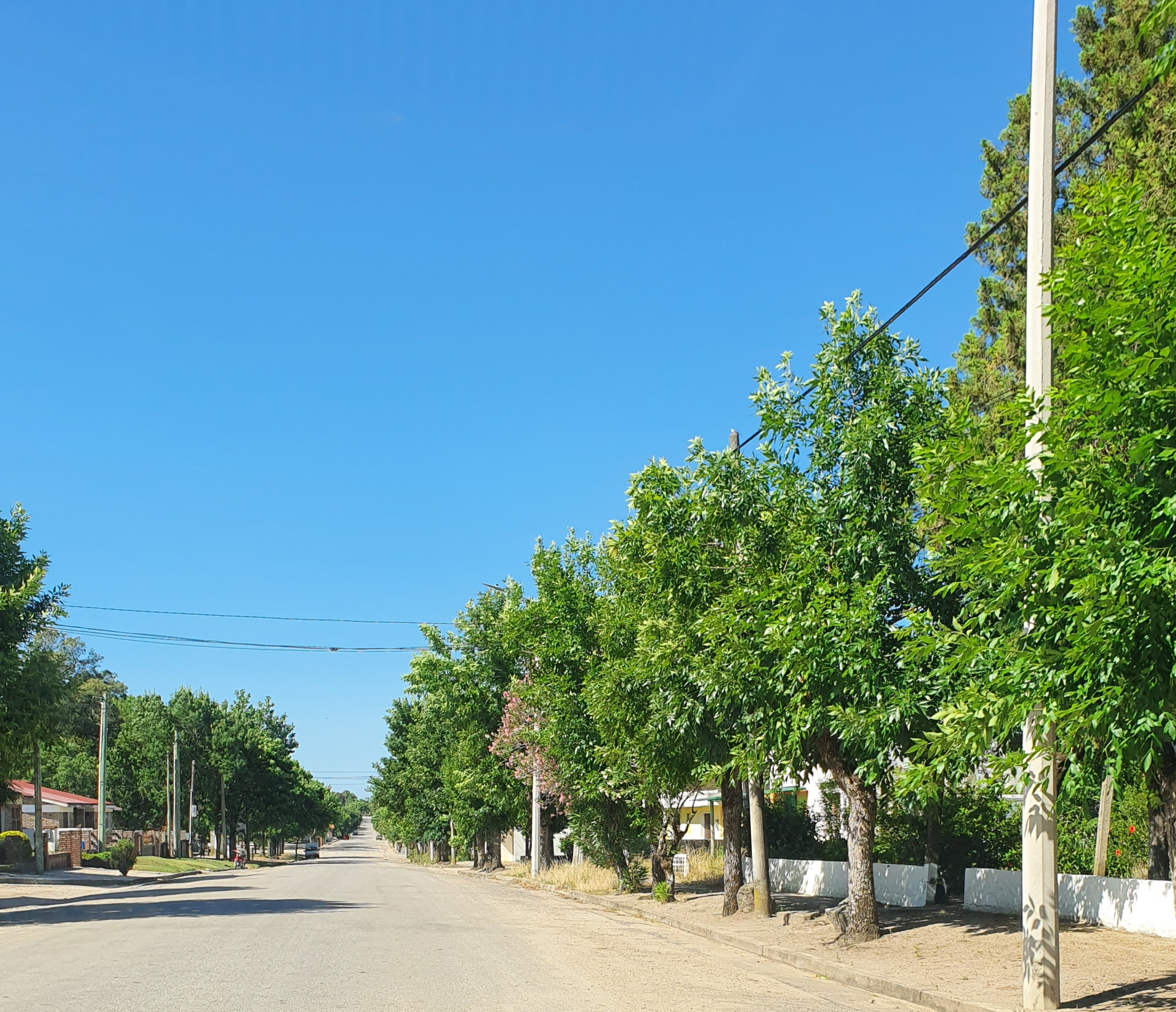 Calle Artigas en la localidad de 25 de Mayo, Florida, Uruguay.